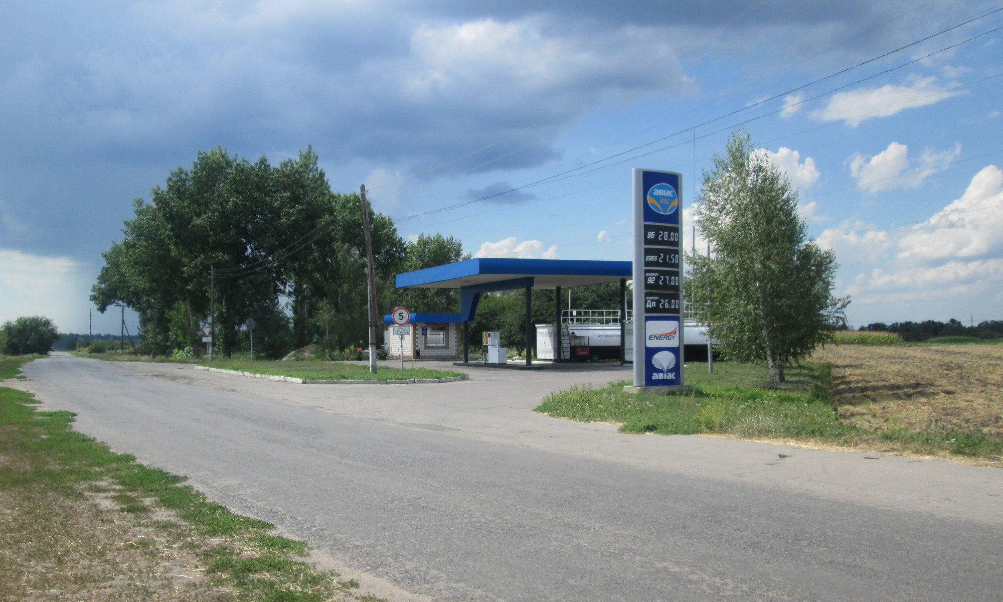 Автозаправочна станція АЗК ТОВ ВТФ «Авіас» у селі Манжелія (Глобинський район, Полтавська область, Україна)